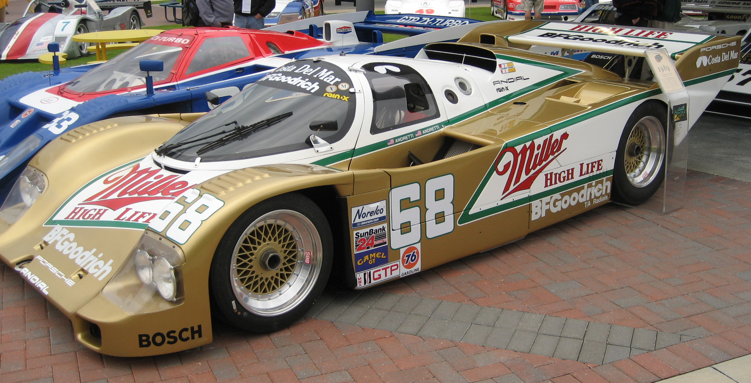 Holbert Racing's Porsche 962 chassis #HR7.